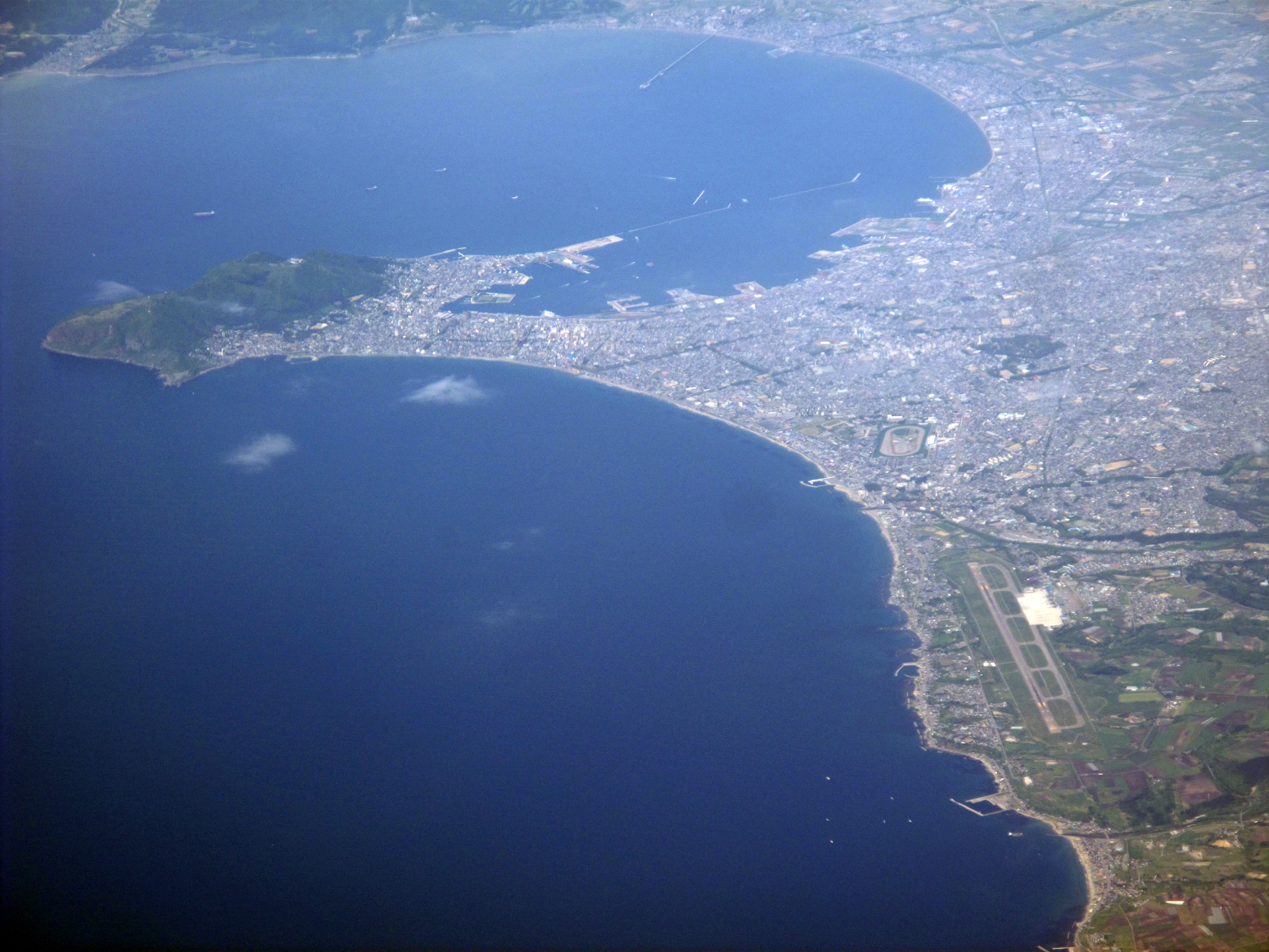 上空からの函館空港と函館の街